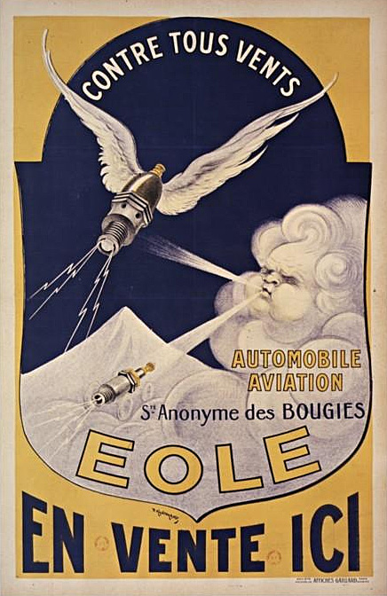 Contre tous vents. Automobile, aviation. Sté anonyme des bougies Eole : affiche